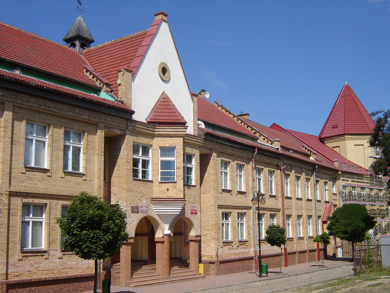 Szkoła Podstawowa i Gimnazjum w Reczu.